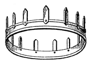 Corona vallaris (Lagerkrone)